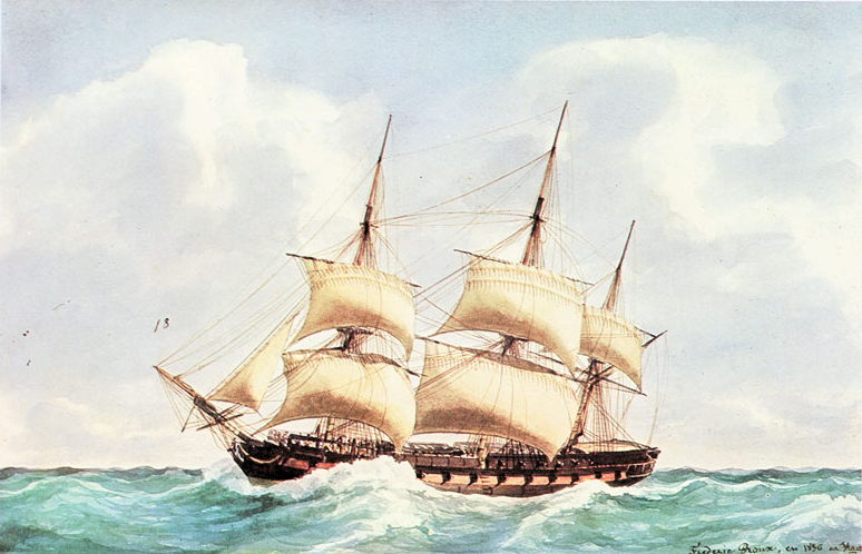 Astrée